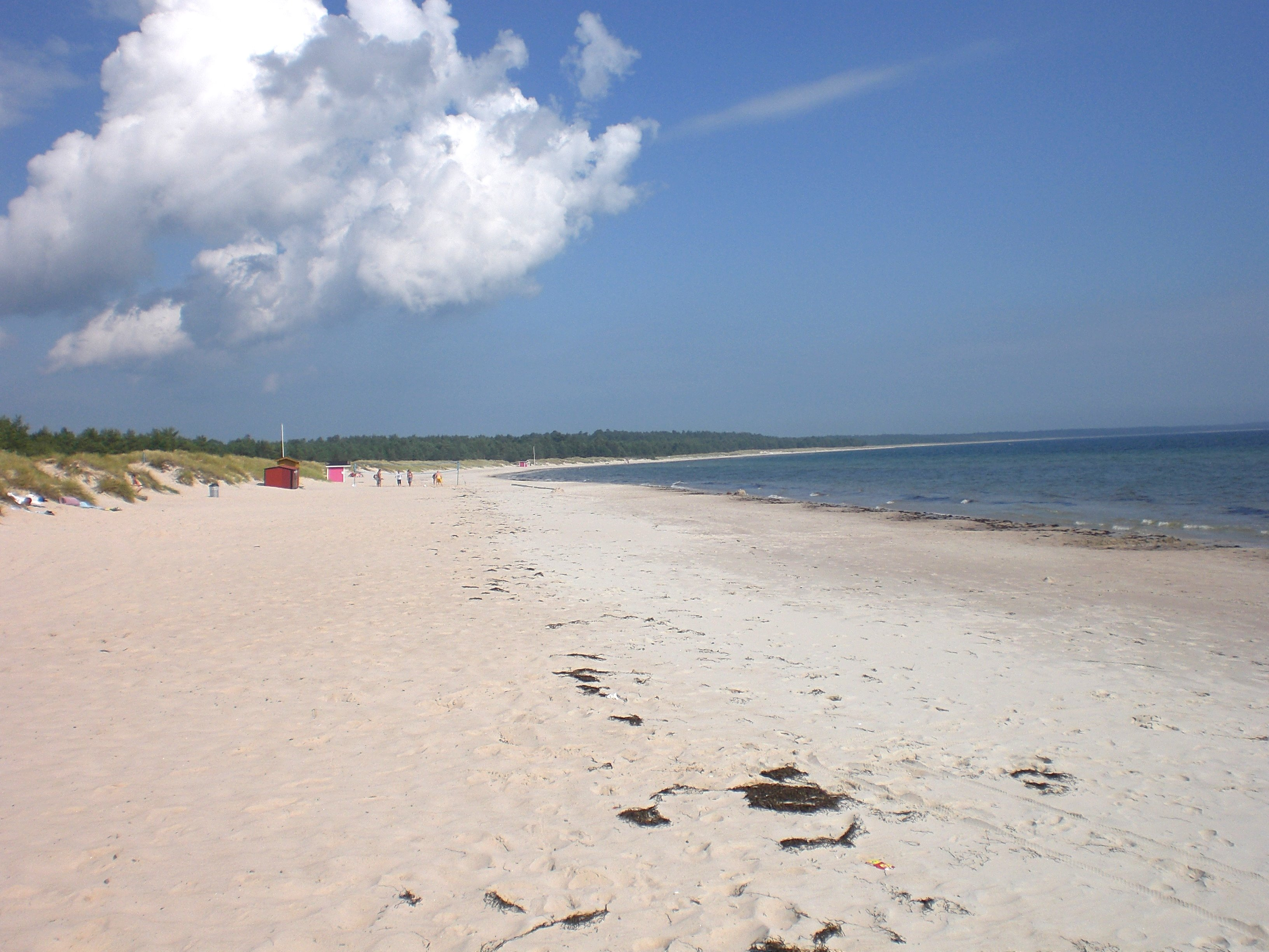 Bödabucht auf Öland, Schweden, Blick von Böda sand nach Norden